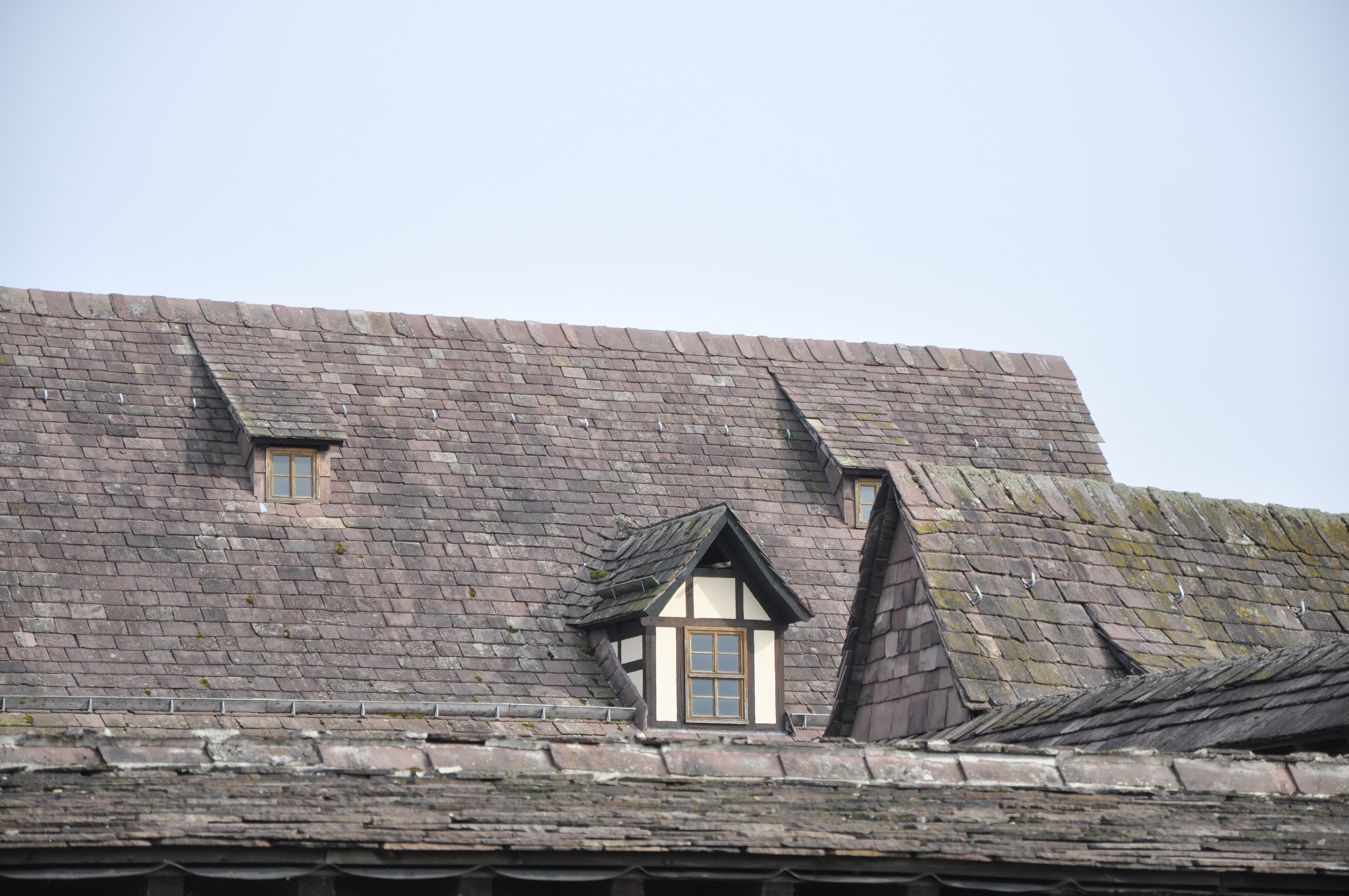 Dachdeckung aus Wesersandstein auf dem Wasserschloss Wülmersen (Landkreis Kassel)